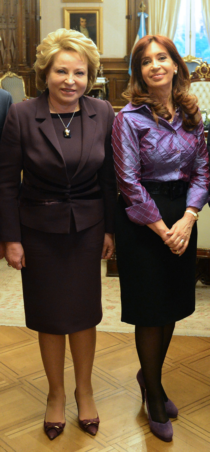 Valentina Matviyenko con Cristina Kirchner y funcionarios argentinos y rusos